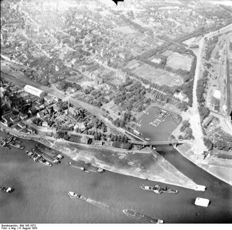 Rheinbefliegung der Alliierten 1953